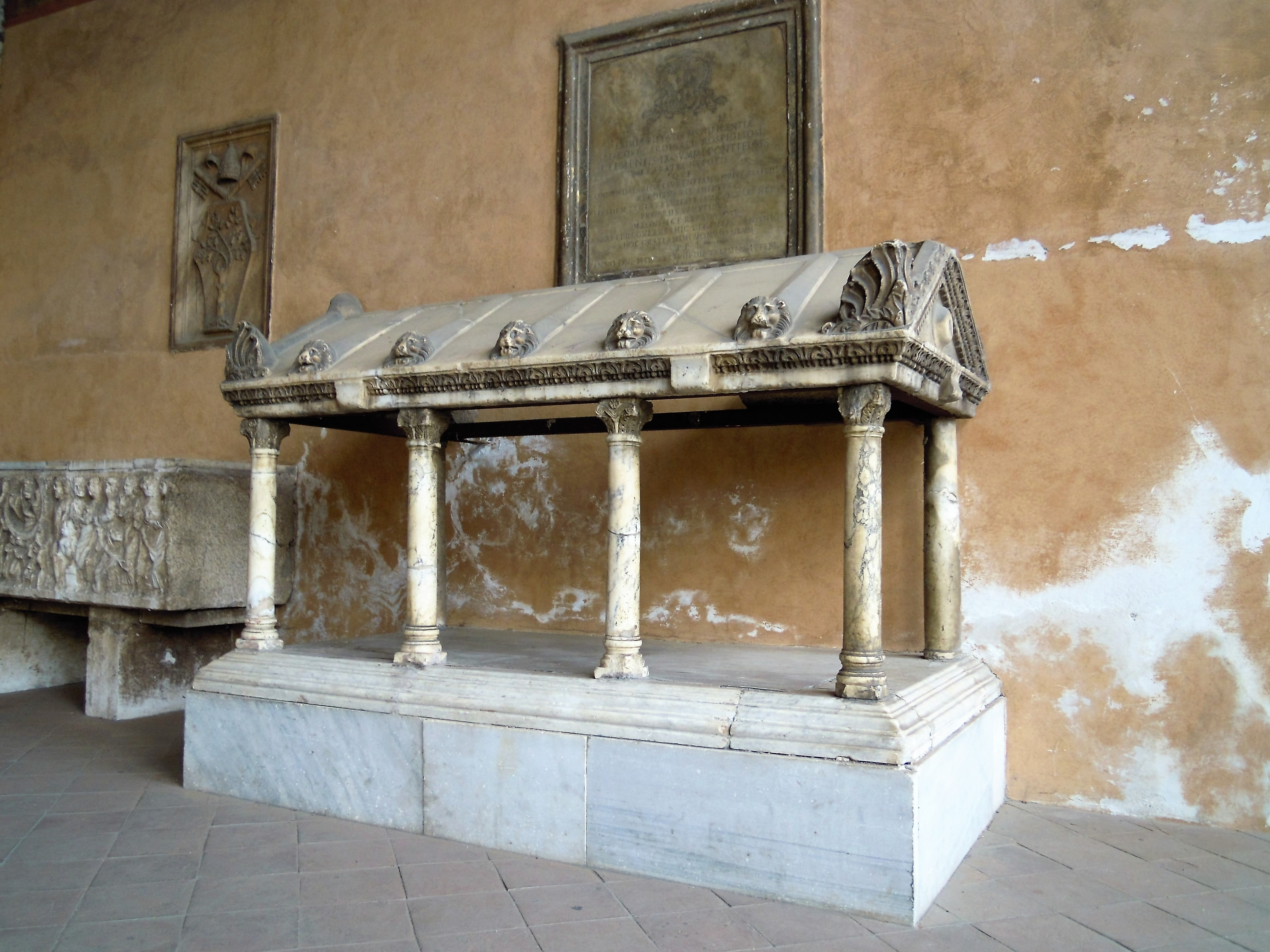 Roma, portico della basilica di San Lorenzo fuori le mura: monumento funebre a tegurio su colonnine